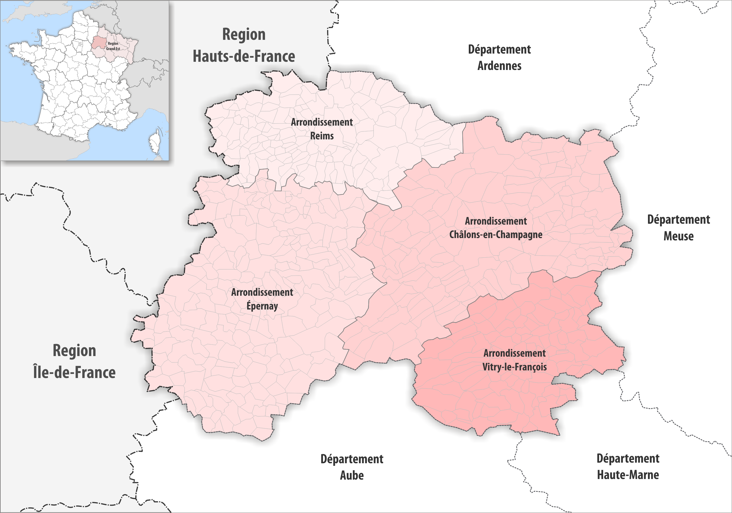 Gemeinden und Arrondissemente im Departement Marne